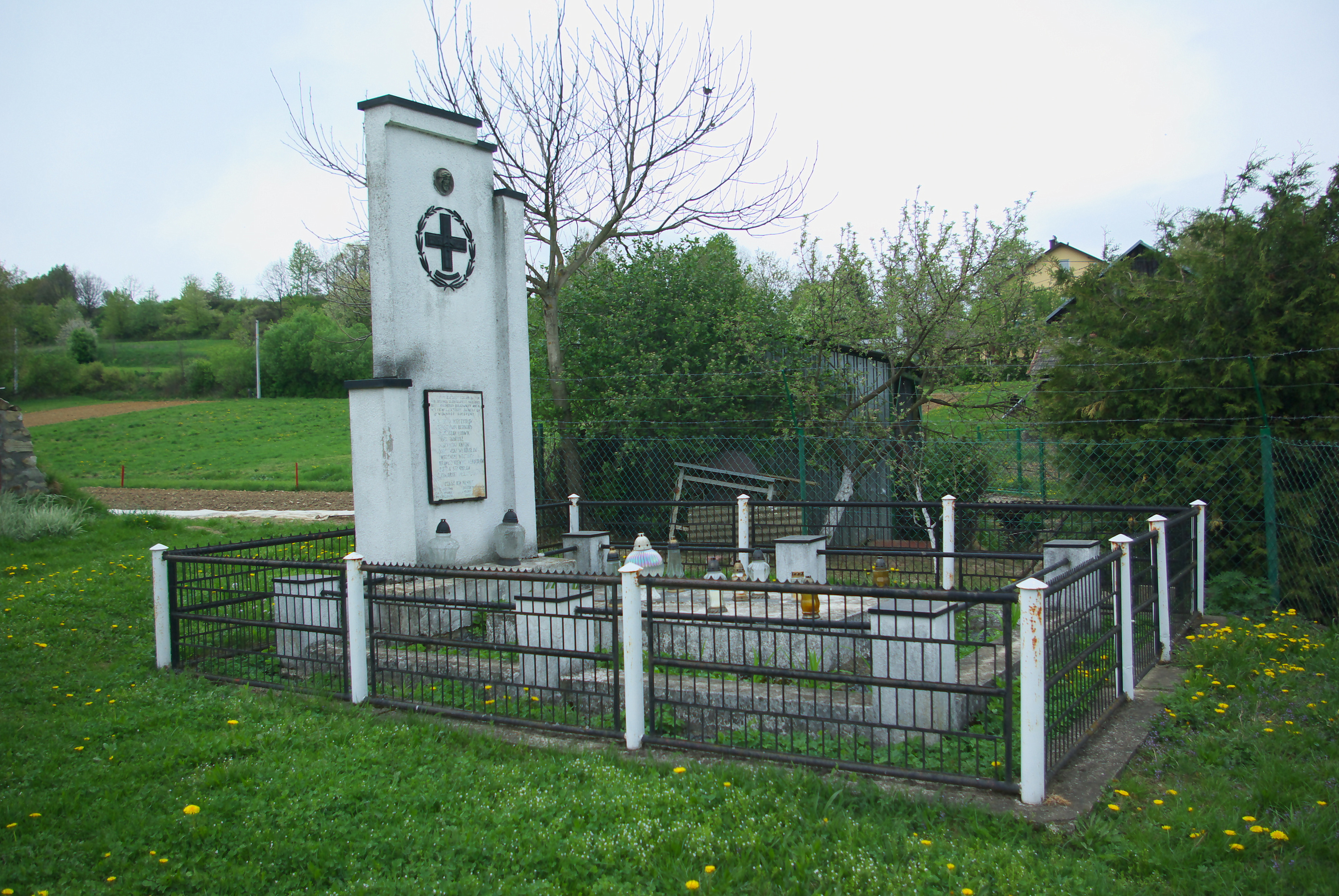 Pomnik rozstrzelanych przez Niemców 20 marca 1944 roku 10 osób w Falejówce.